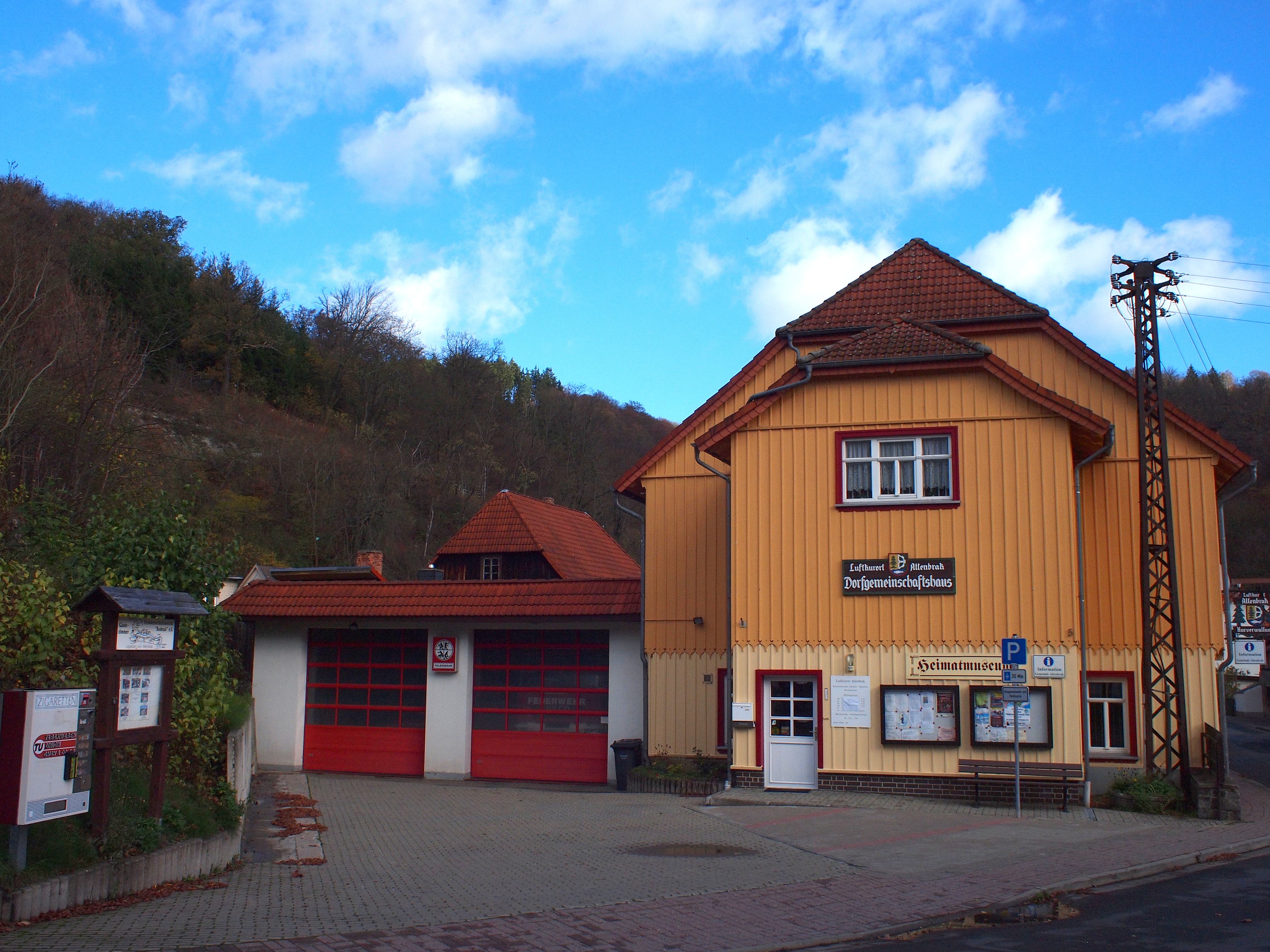 Altenbrak, Landkreis Harz, Sachsen-Anhalt; Unterdorf, Dorfgemeinschaftshaus, links: Feuerwehr